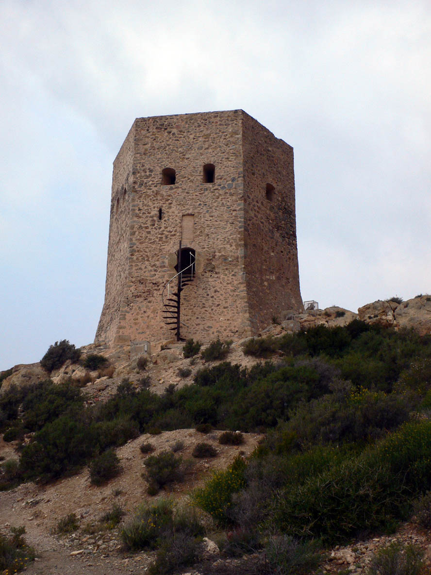 Torre de Santa Elena en La Azohía (Cartagena). Construida durante el reinado de Felipe II en el s.XVI para la defensa contra los piratas berberiscos.